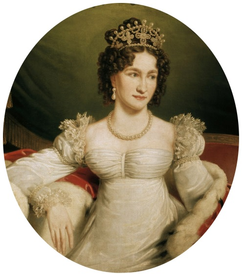 Kaiserin Karolina Augusta